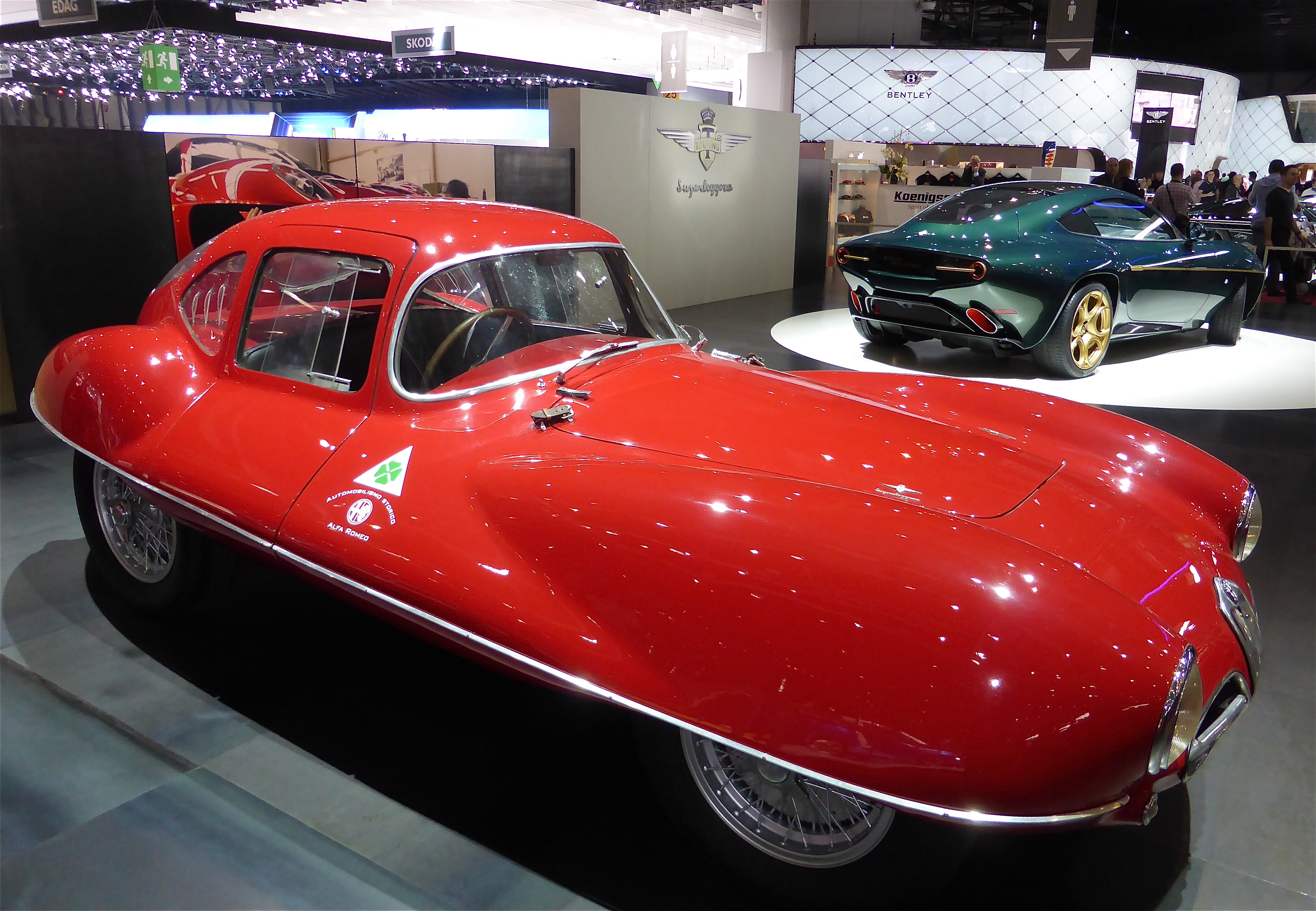 Prototype Alfa Roméo Disco Volante coupé